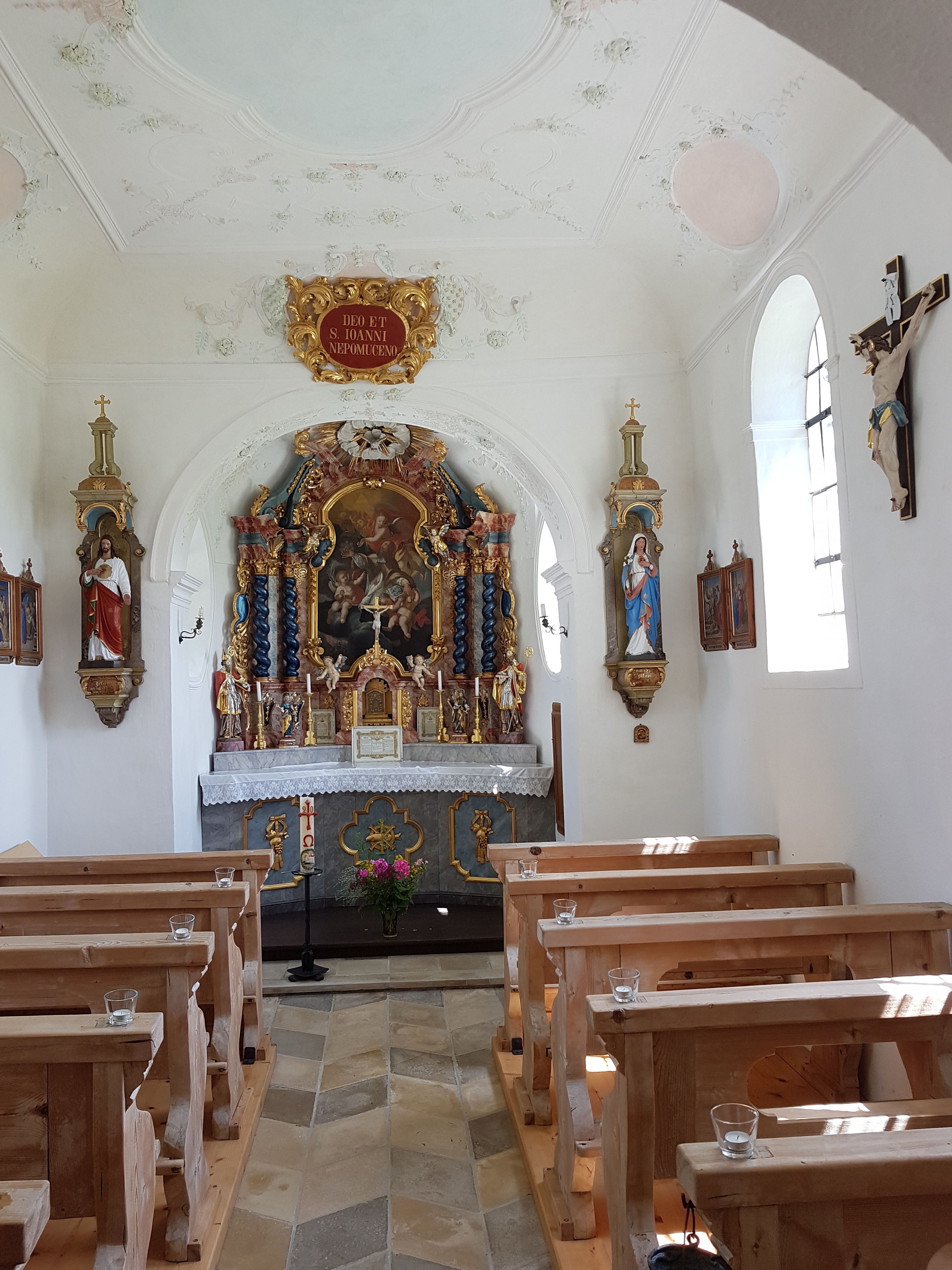 Günther (Bernbeuren), Kapelle Johann Nepomuk, Innenraum